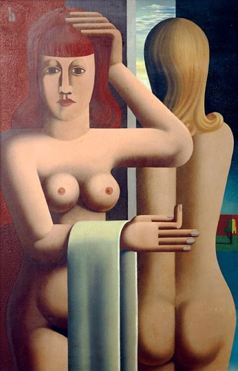 Heinrich Hoerle: Zwei Frauen, 1930. Öl auf Holz, 108 x 73 cm. Museum Ludwig, Köln